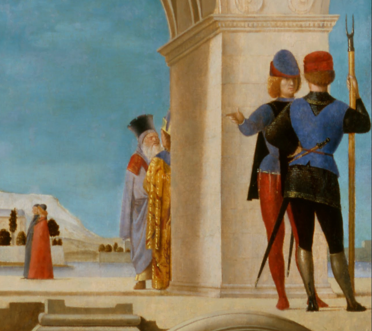 détail des personnages de droite